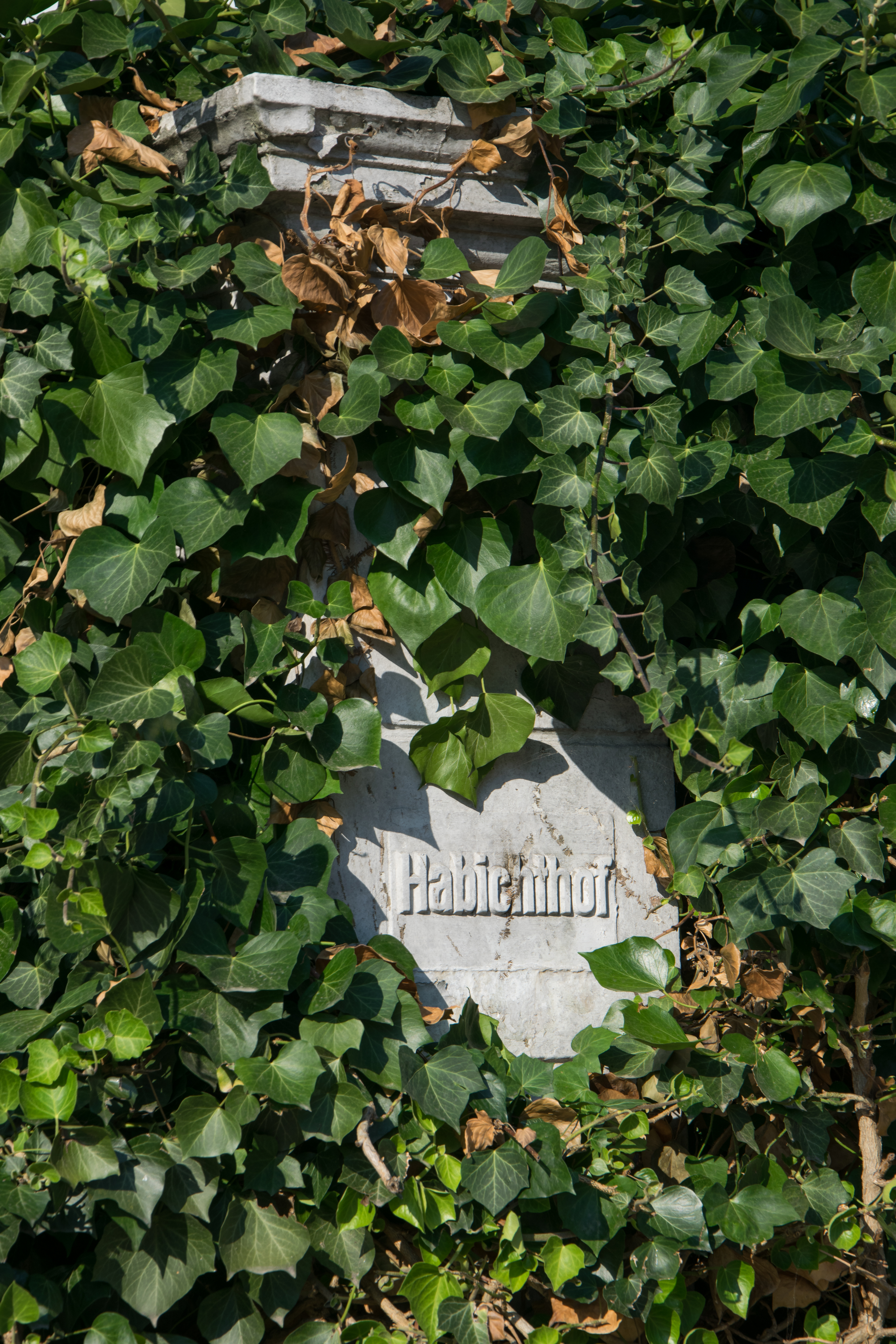 Tor zum ehemaligen Habichthof Barmbek Detail